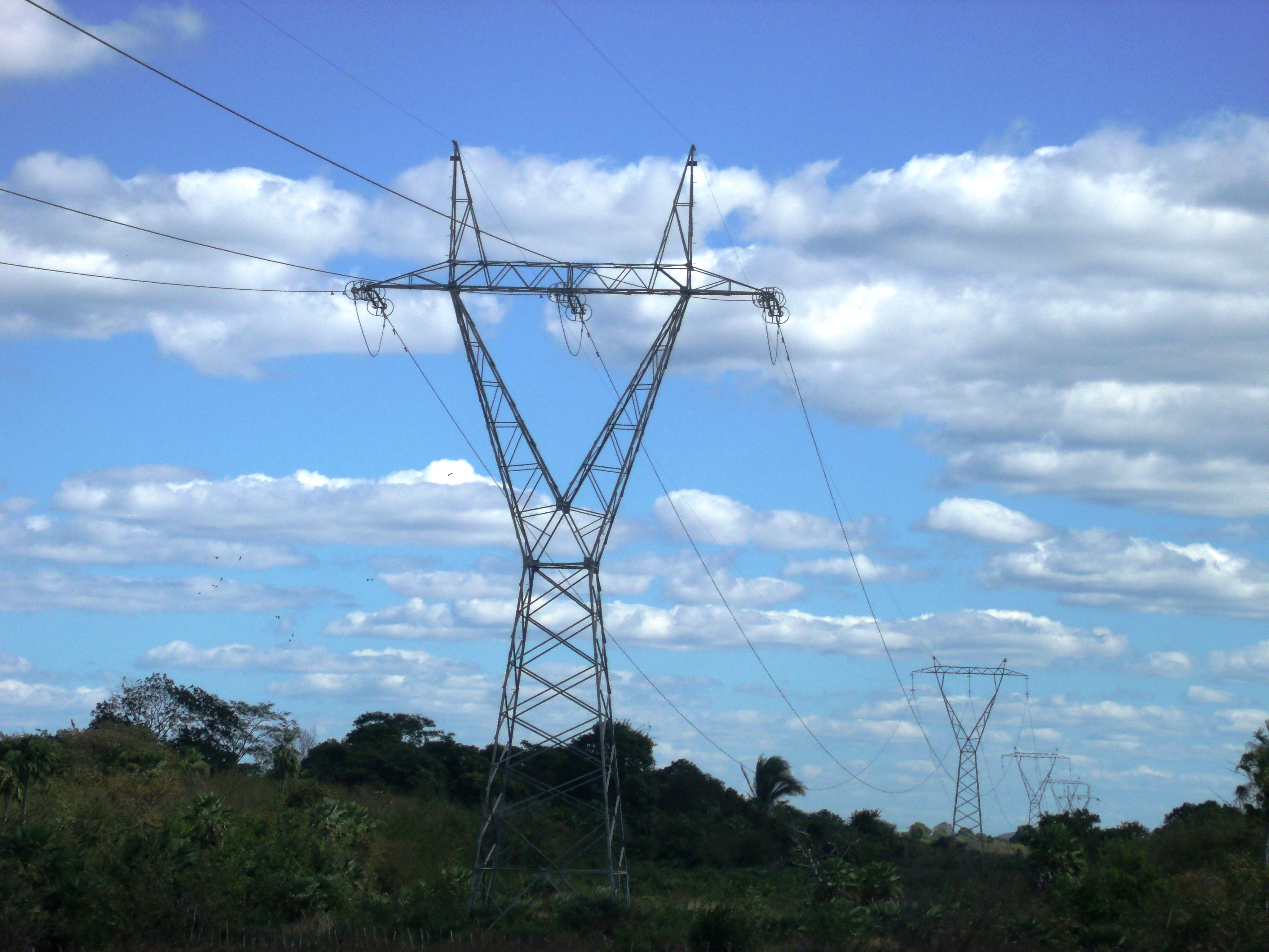 Torres de eletrificação no Piauí.